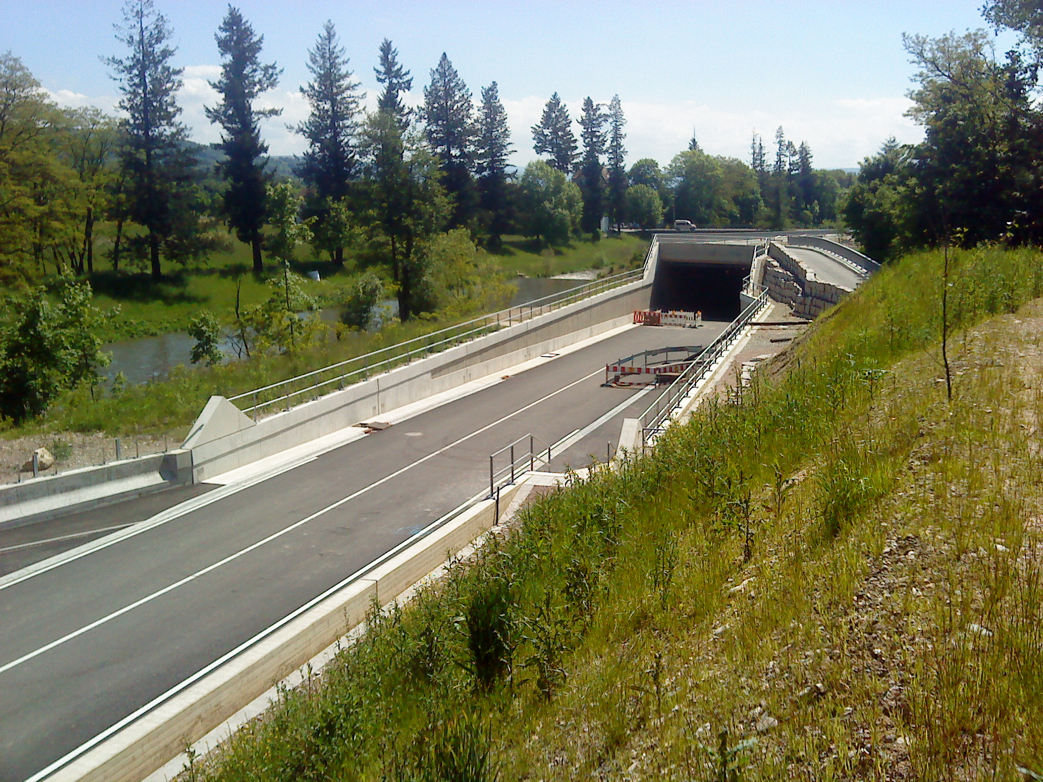 Tunnel der Zollfreistrasse.